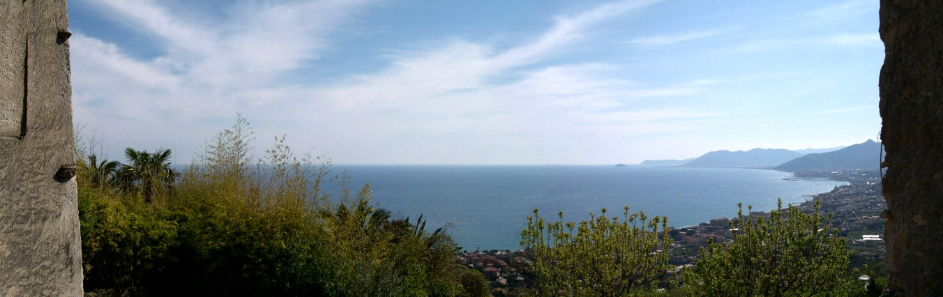 Il golfo della Riviera di Ponente di fronte a Borgio, visto dalla Piazzetta Sant'Agostino a Verezzi. Foto scattata da Stefano Trezzi (Utente:Yoruno) e da me licenziata secondo la licenza sotto indicata.